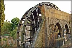 Noria de la localidad de Alcantarilla, Murcia